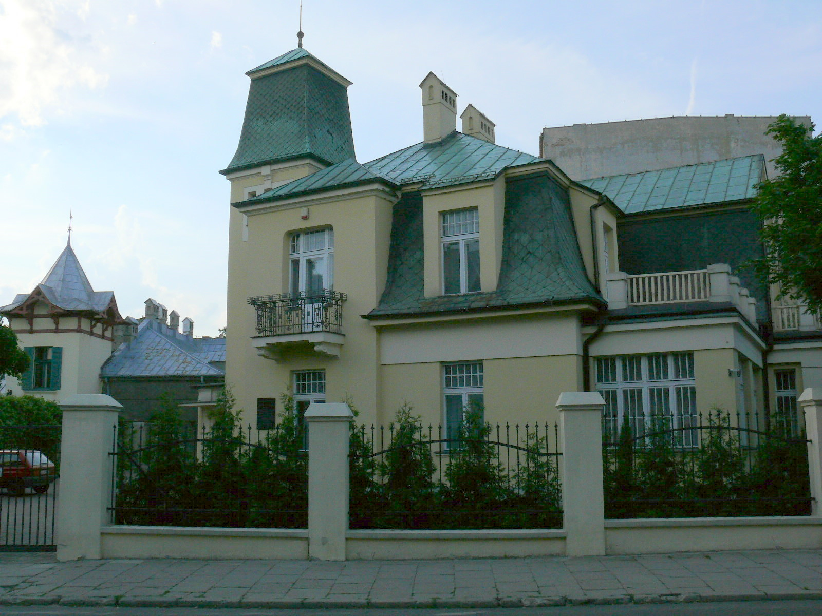 zespół willi Oskara Zieglera, ul. Skłodowskiej-Curie 11 Łódź